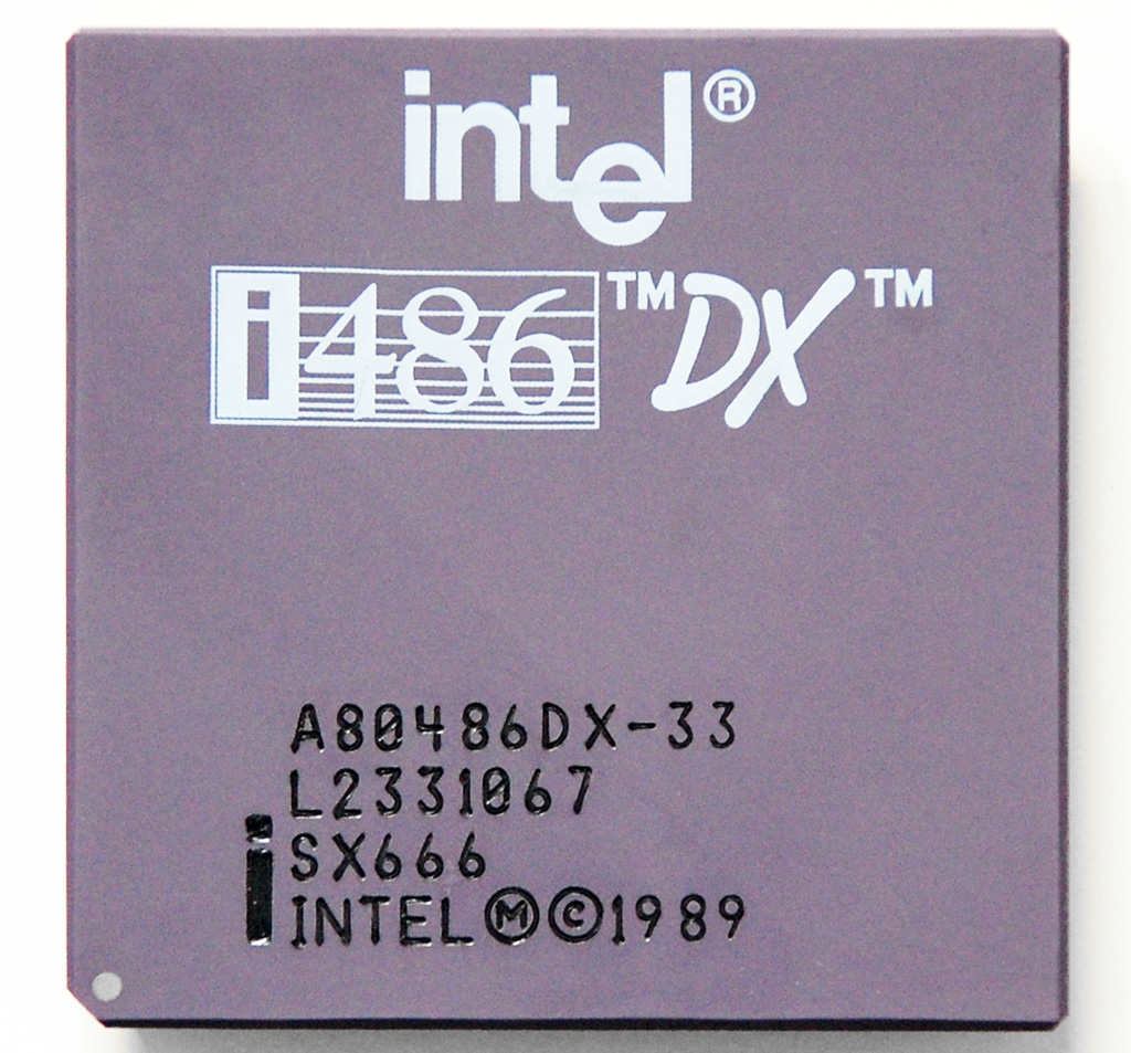 Intel i486 DX-33 Prozessor